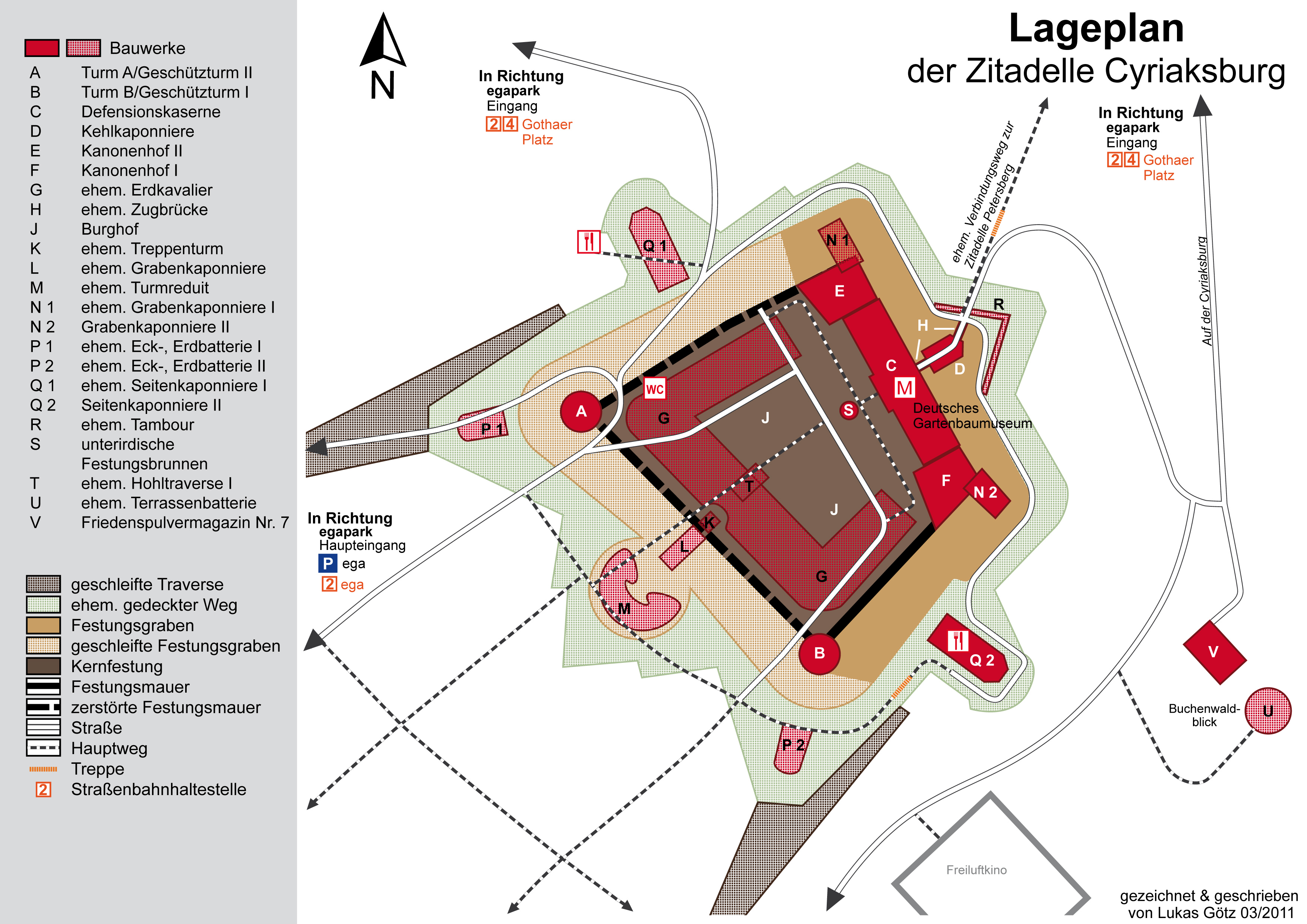 Lageplan der Zitadelle Cyriaksburg von 2007